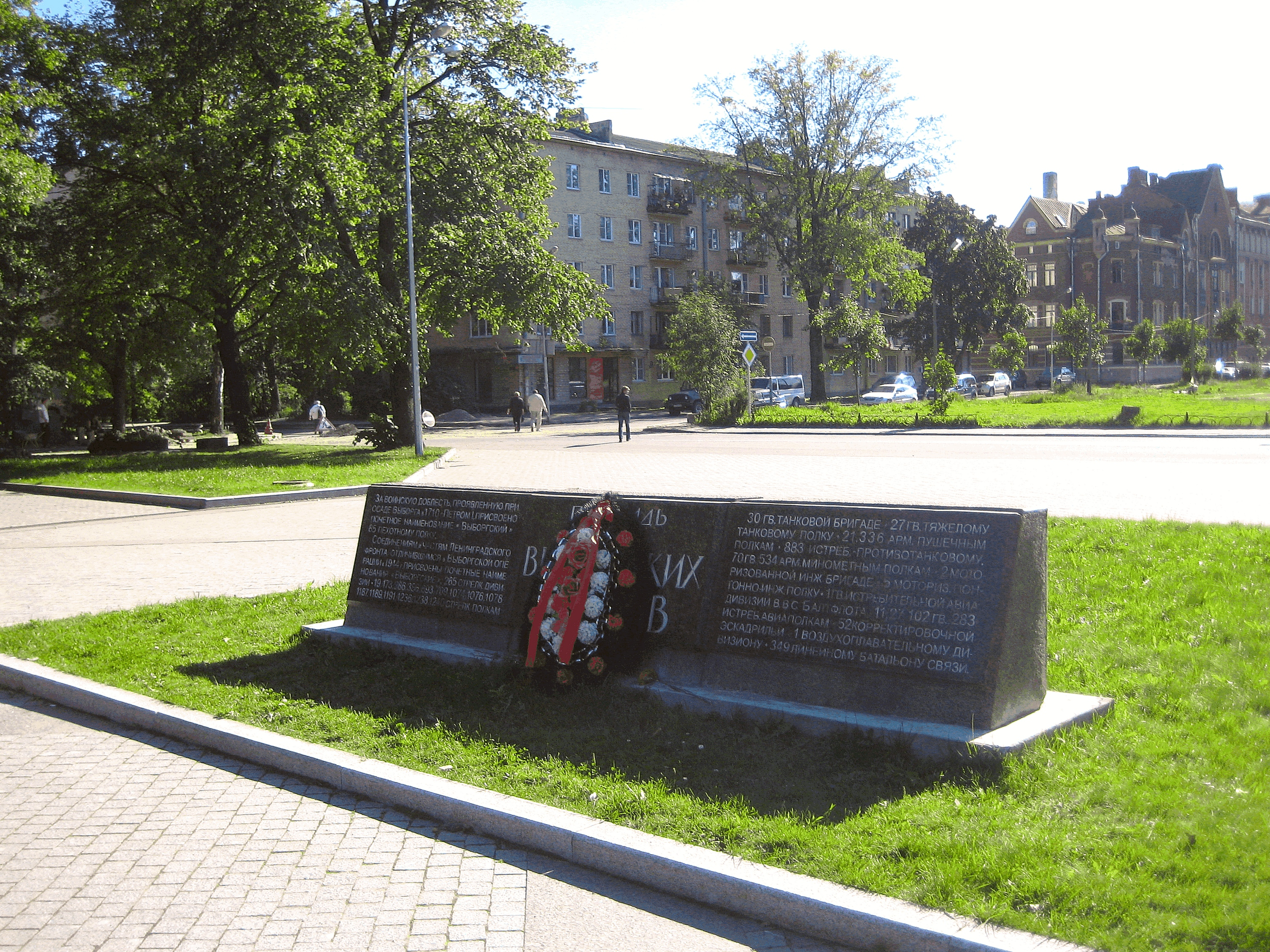 Выборг. Площадь Выборгских полков